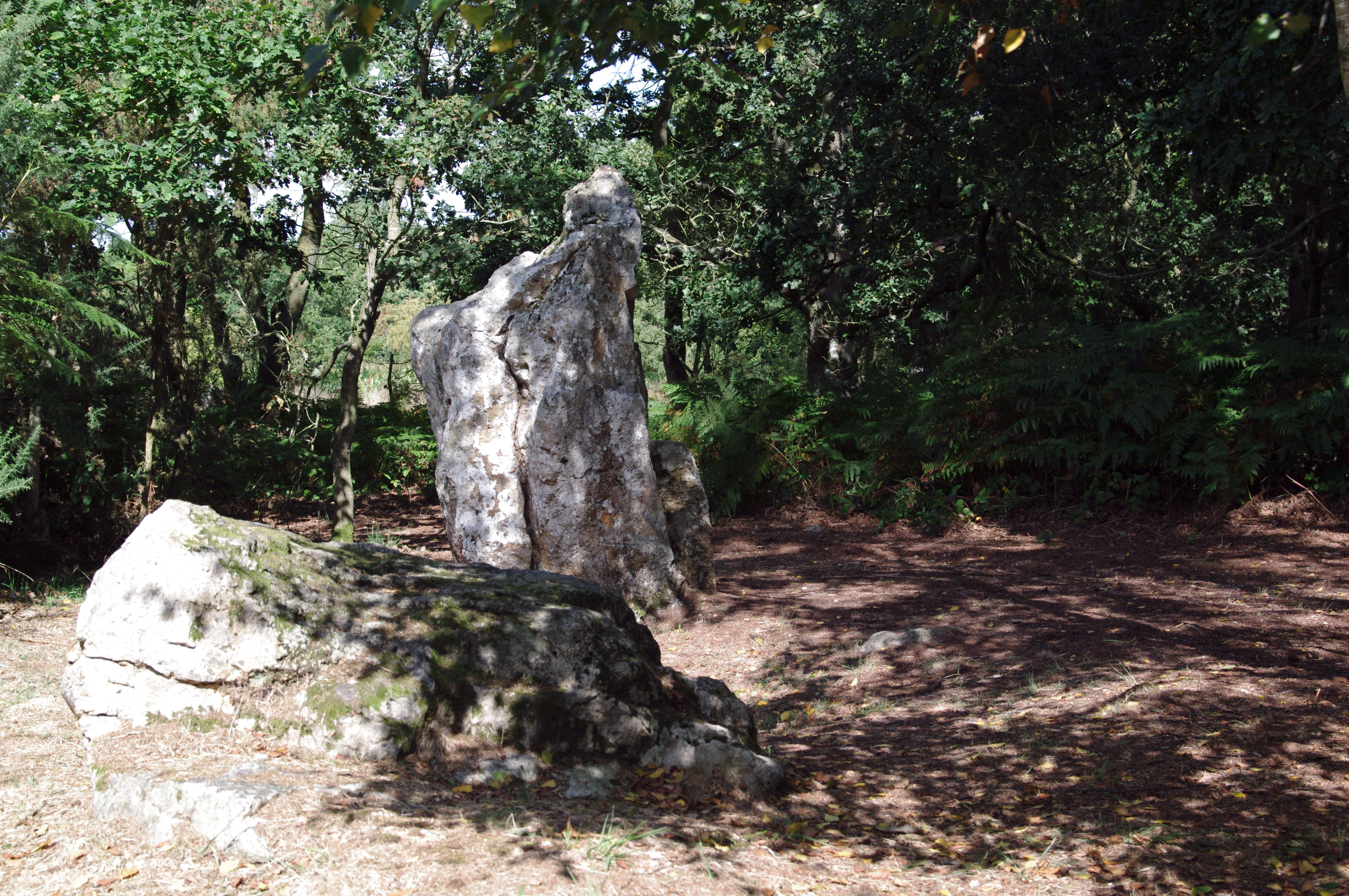 Site mégalithique de la Lande du Gras (Inscription Classement) .